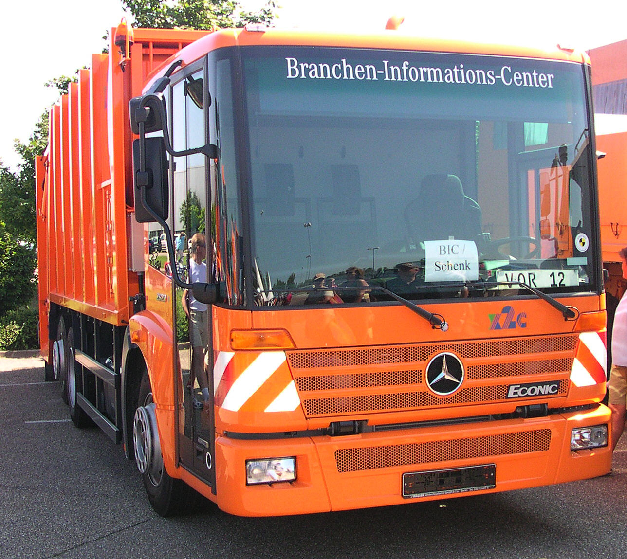 Oldtimertreffen bei Daimler Chrysler in Wörth am Rhein. Mercedes Econic Müllwagen